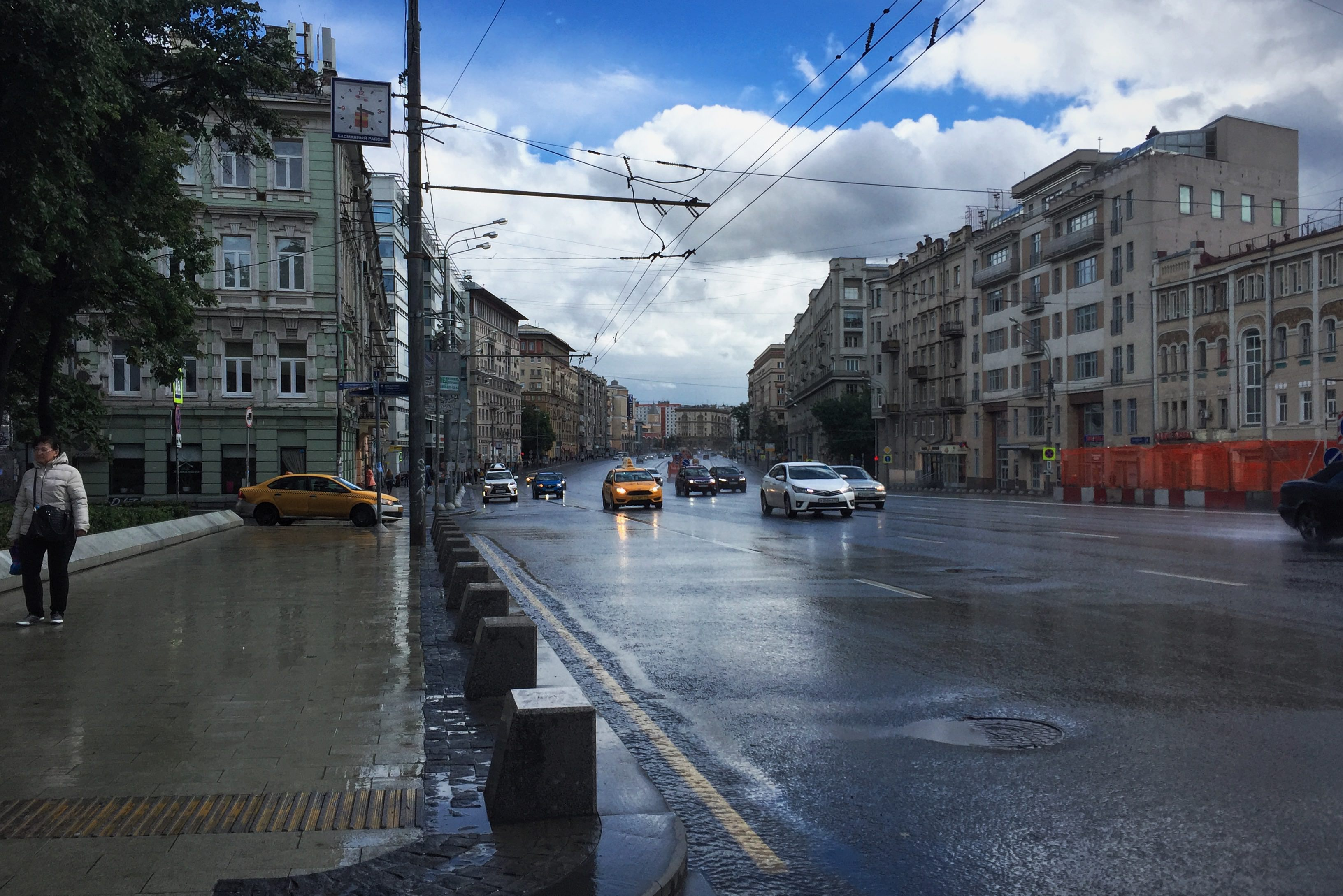 Земляной Вал. Вид от Чкаловского сквера (который между Старой Басманной и Казакова) на дом 7 и далее на юг